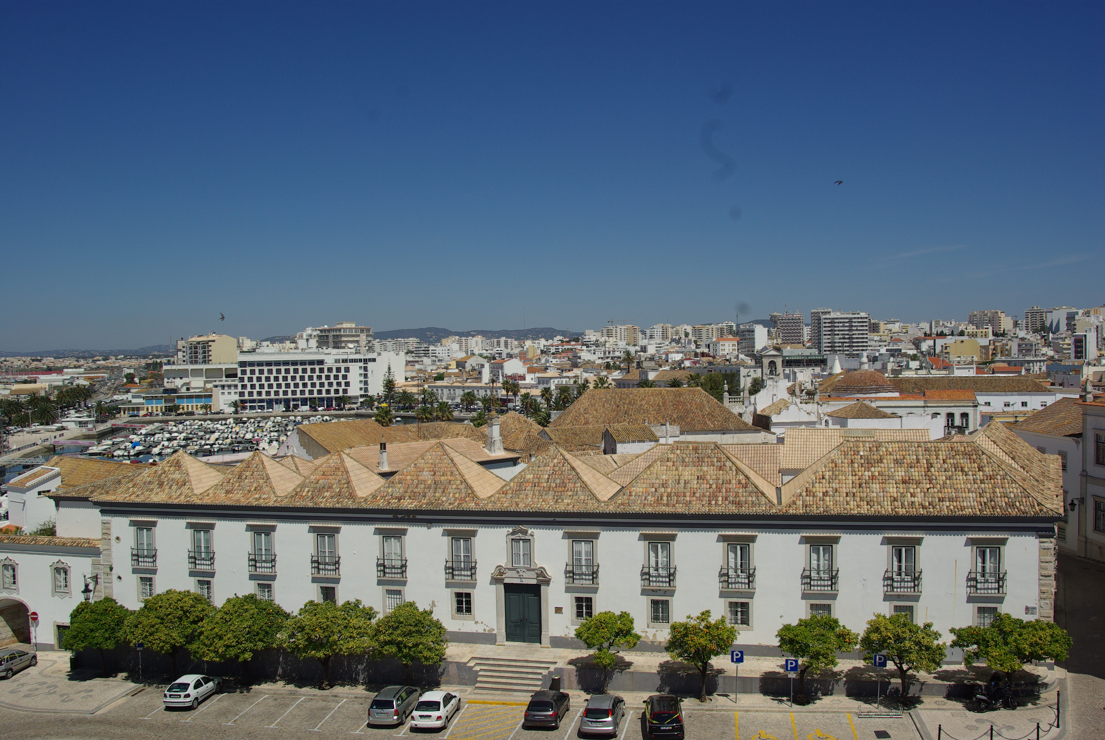 FARO CIUDAD VIEJA CATEDRAL VISTAS PANO (A) 3 de 4